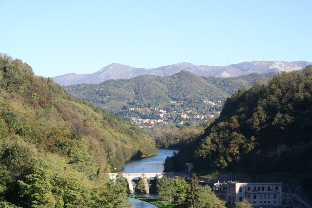 Autore Giorces. L'Adda tra Calusco e Paderno d'Adda.